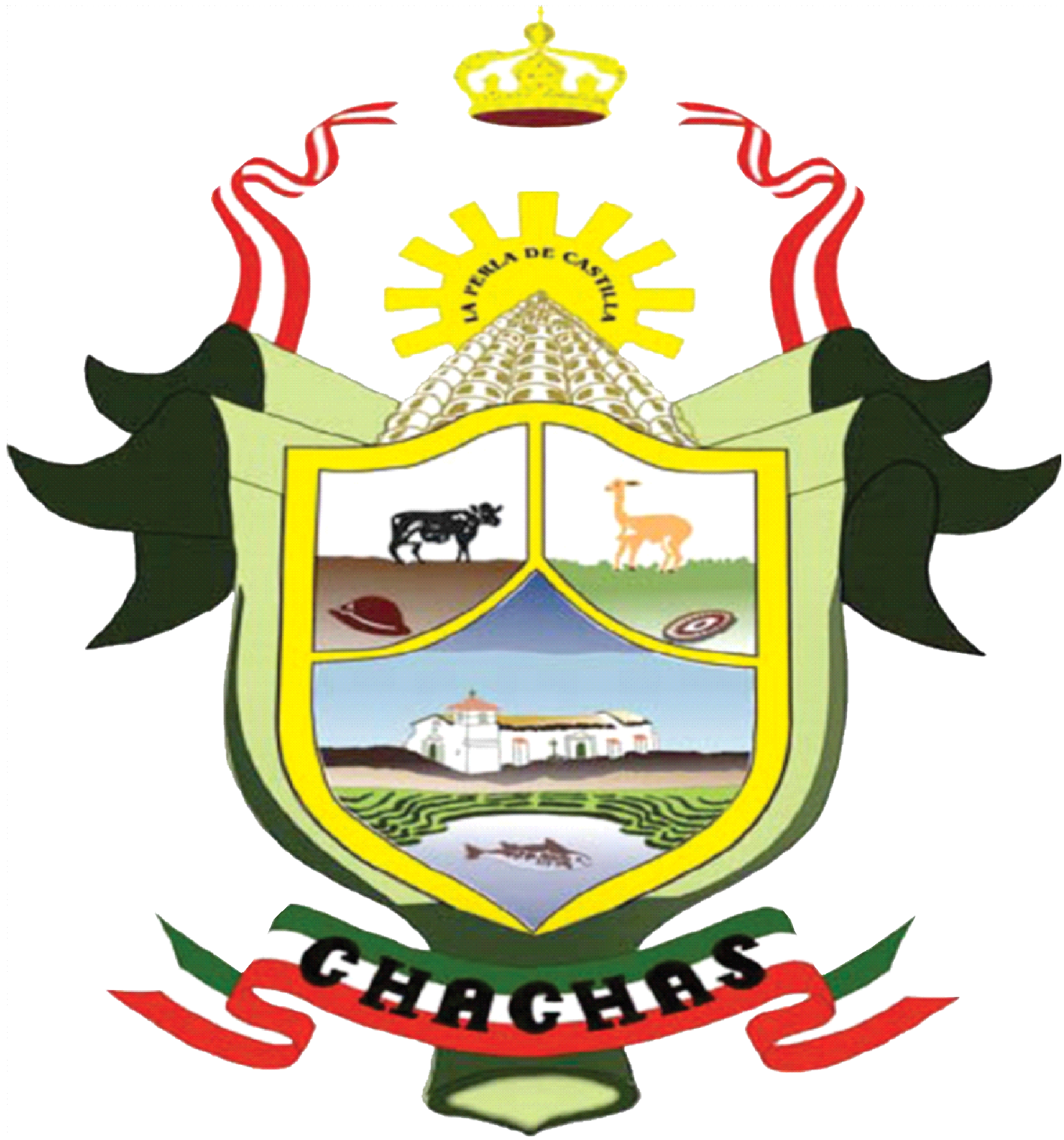 Este es el escudo del distrito de Chachas, provincia de Castilla, Región Arequipa